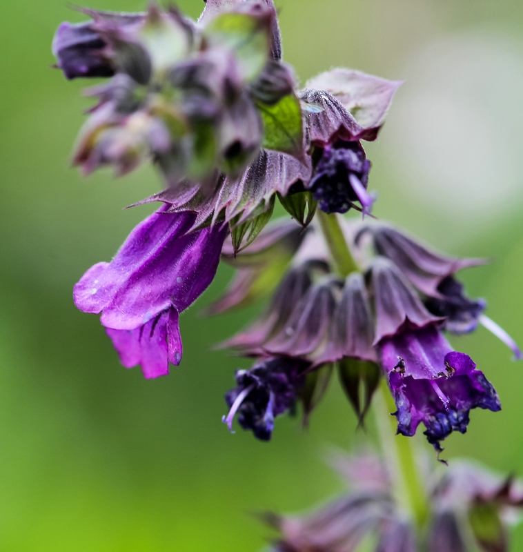 Alpengarten Villacher Alpe: Drachenmaul